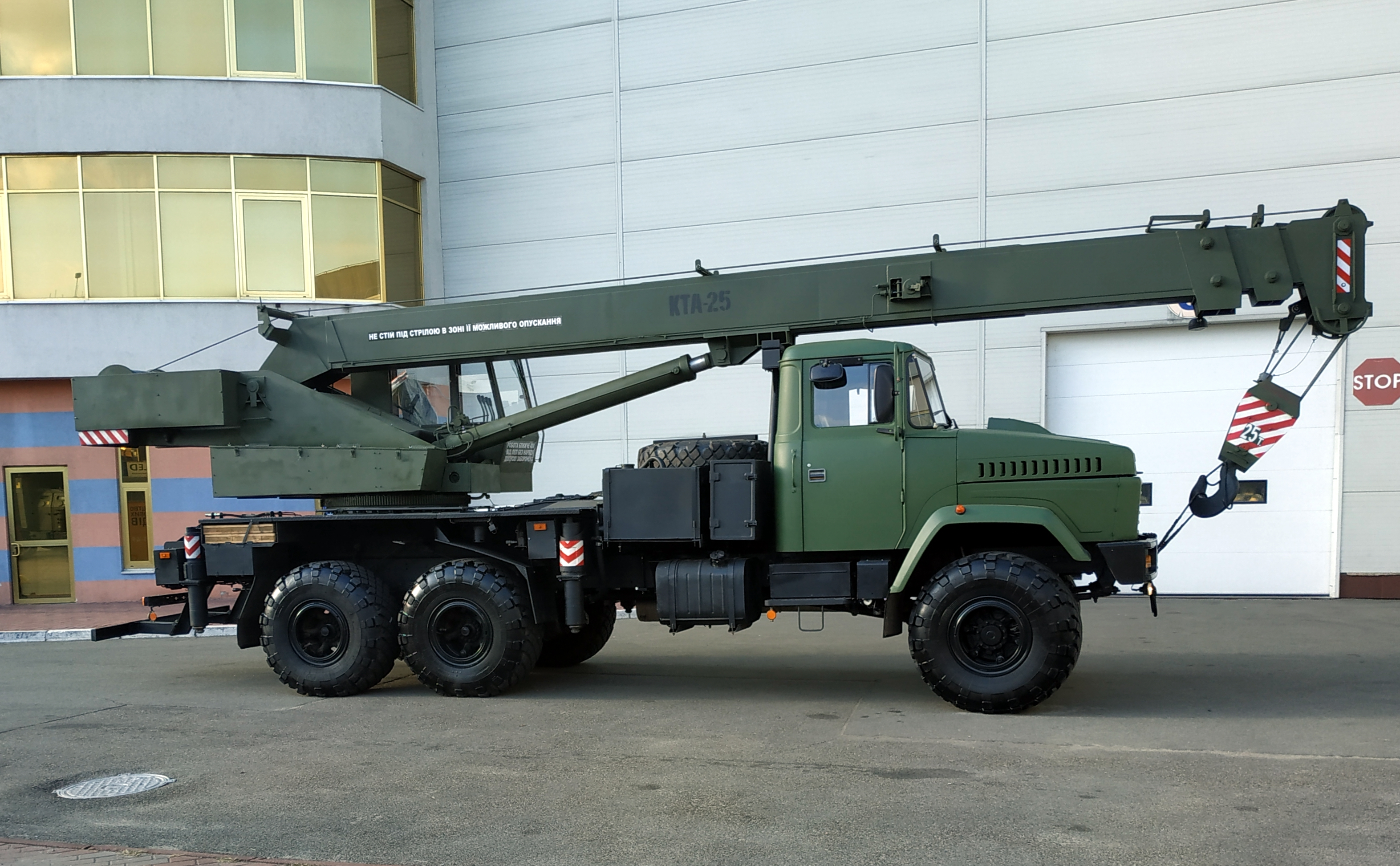 Войсковой автокран КТА-25 на шасси КрАЗ-6322 в экспозиции Дрогобычского завода автокранов. Выставка "Зброя та безпека", Киев, октябрь 2019 г.